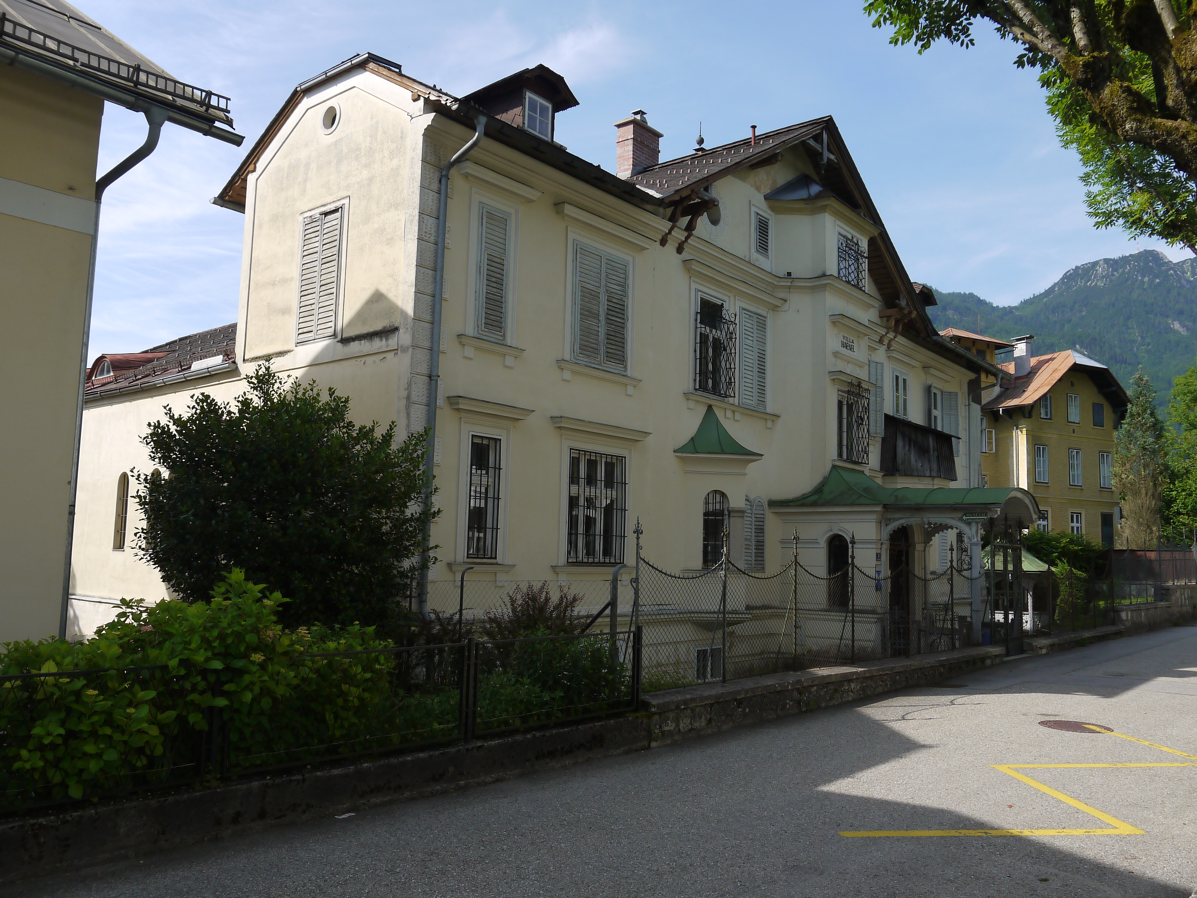 Ehem. Villa Vockner, Villa Haenel-Pancera